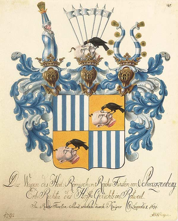 „Das Wappen der Heil. Römischen Reichs Fürsten von Schwarzenberg, Erb-Richter des Hoff-Gerichts in Rottweil, im Reichs-Fürsten-Stand erhoben durch Kaiser Leopold 1671“ datiert 1792 Temperazeichnung, 24 x 19 cm